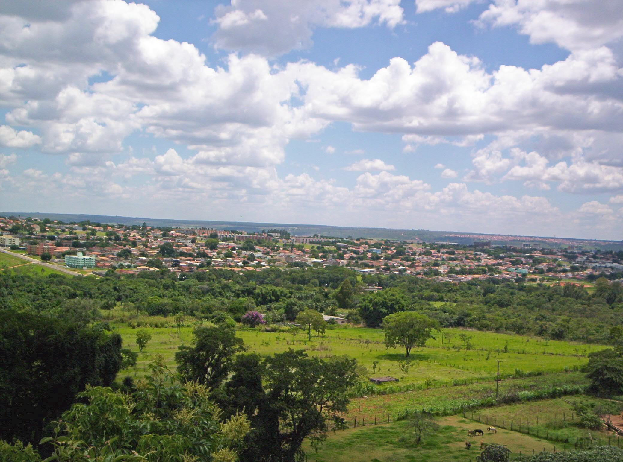 Vista parcial de Sobradinho, DF, Brasil